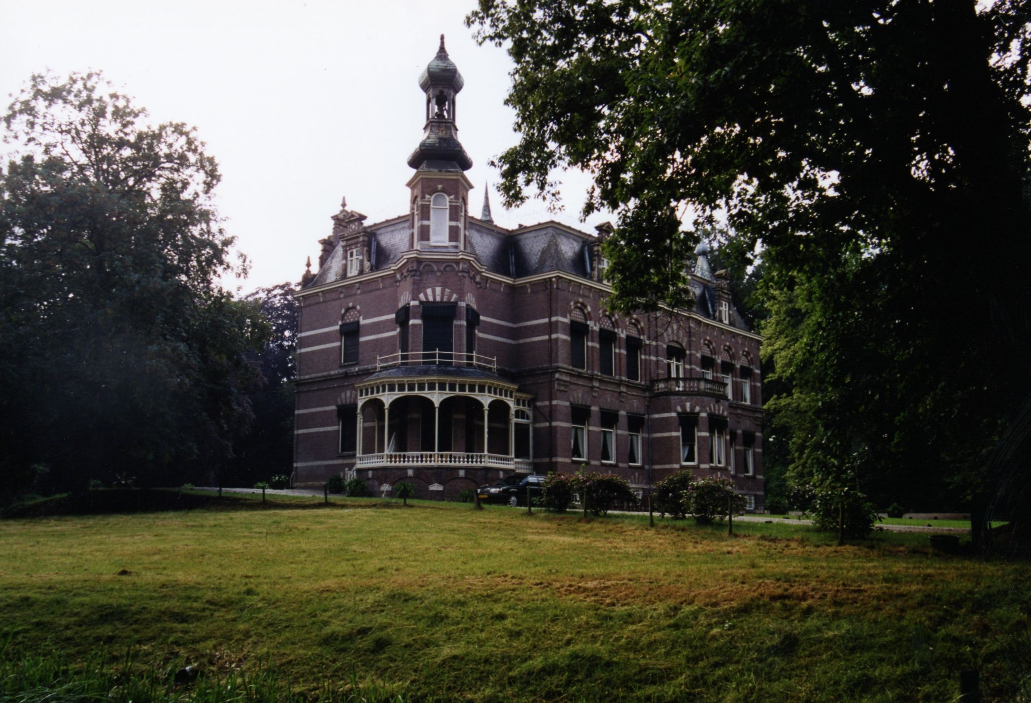 Huis 't Suideras te Vierakker.